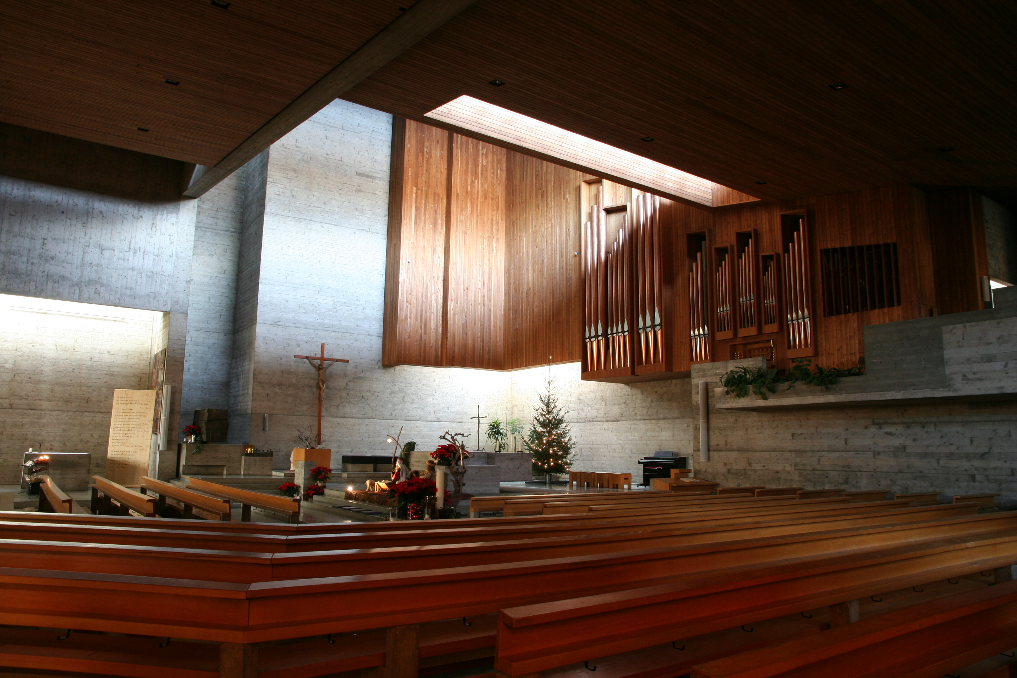 Römisch-katholische Pfarrkirche Herz Jesu in Buchs SG, erbaut von Justus Dahinden